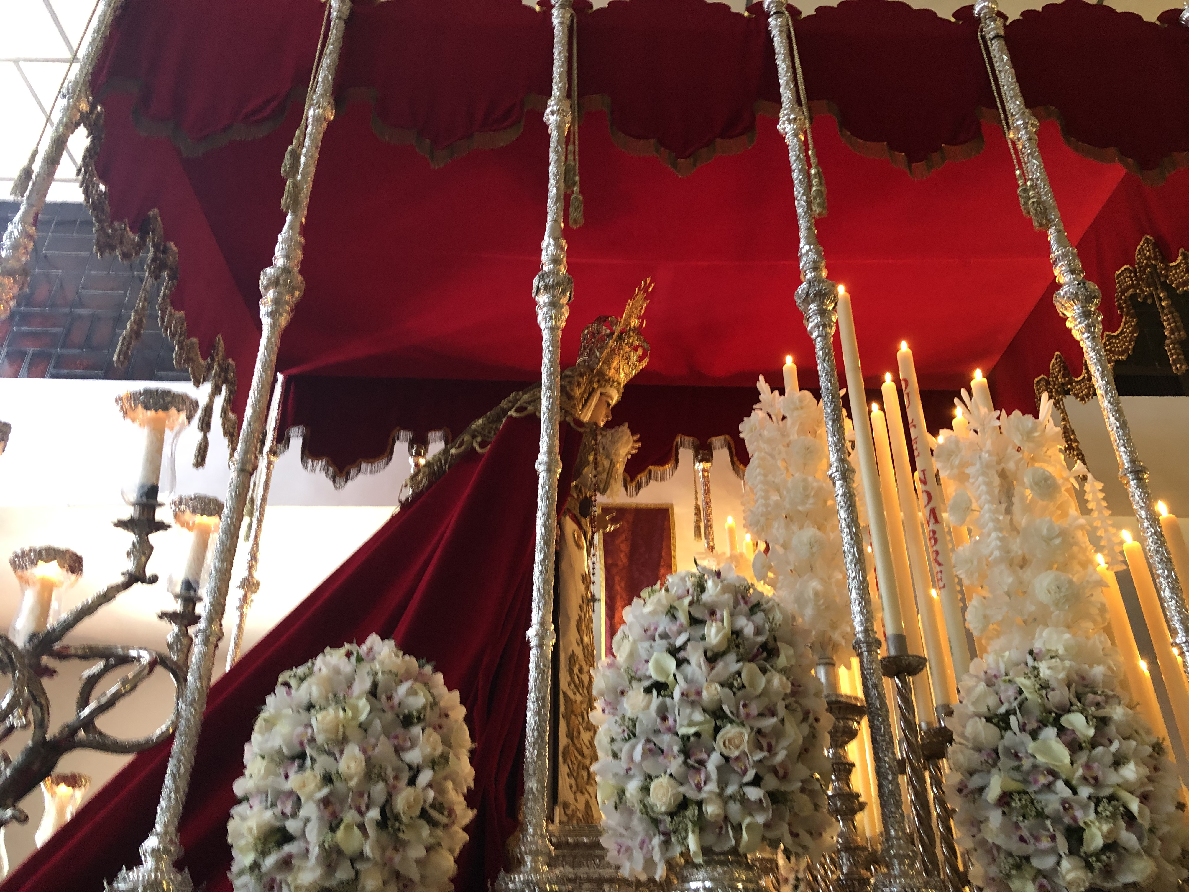 Virgen caridad granada